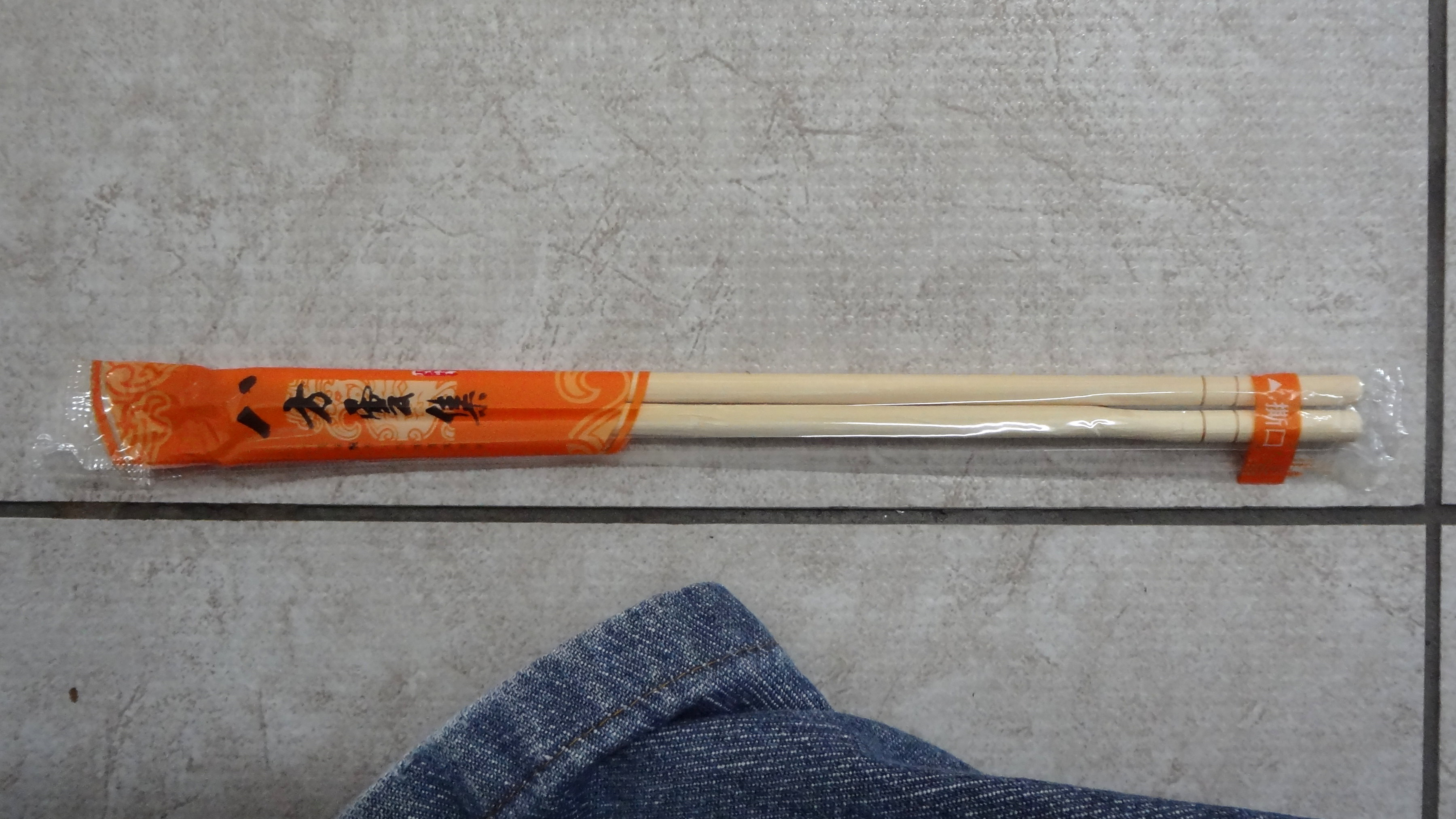 八方雲集鍋貼水餃專賣店免洗筷1雙。